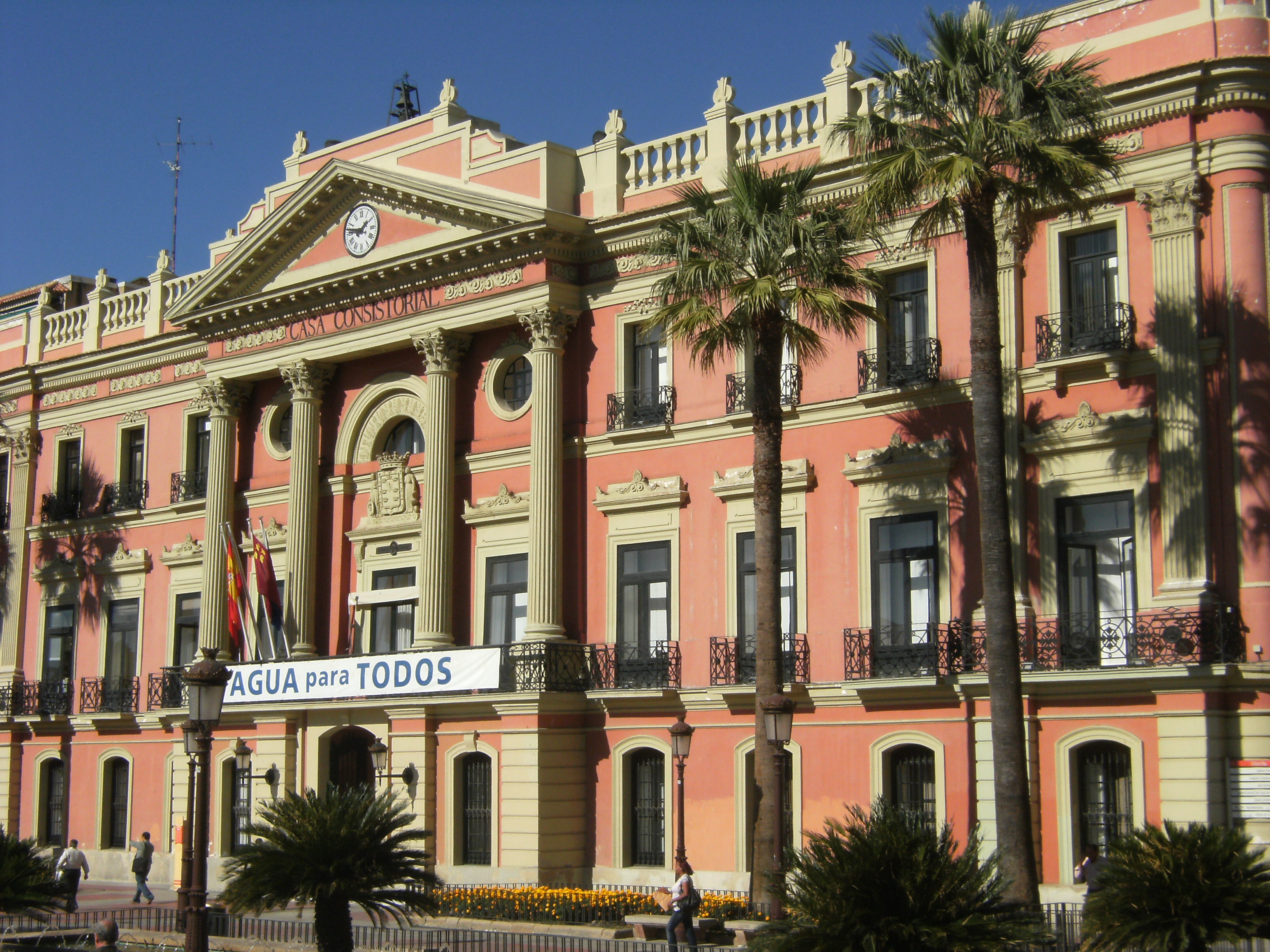 Casa Consistorial o Ayuntamiento de Murcia, presidiendo la plaza de La Glorieta.